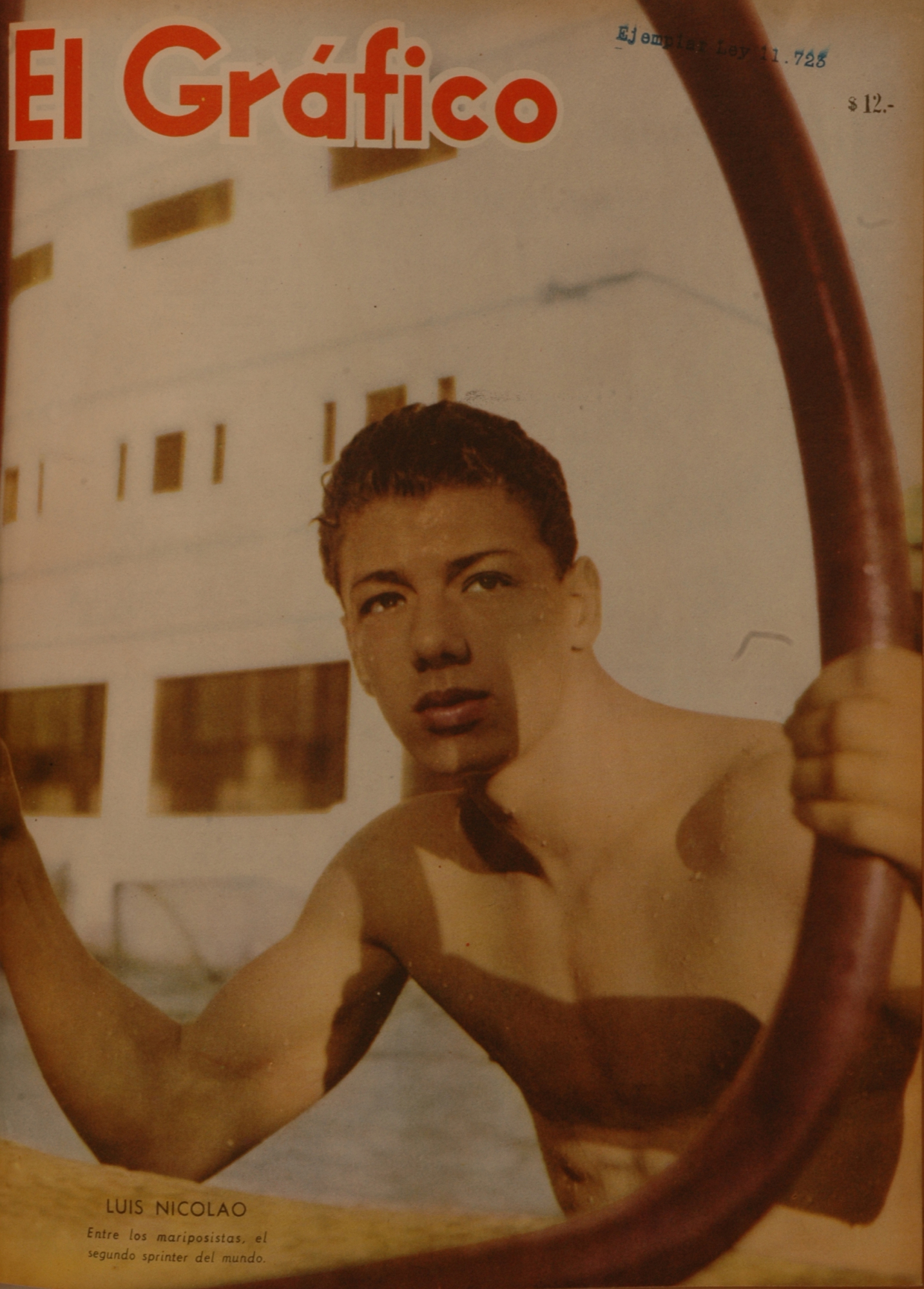 El Grafico del 12 de Abril de 1961. Edicion 2167